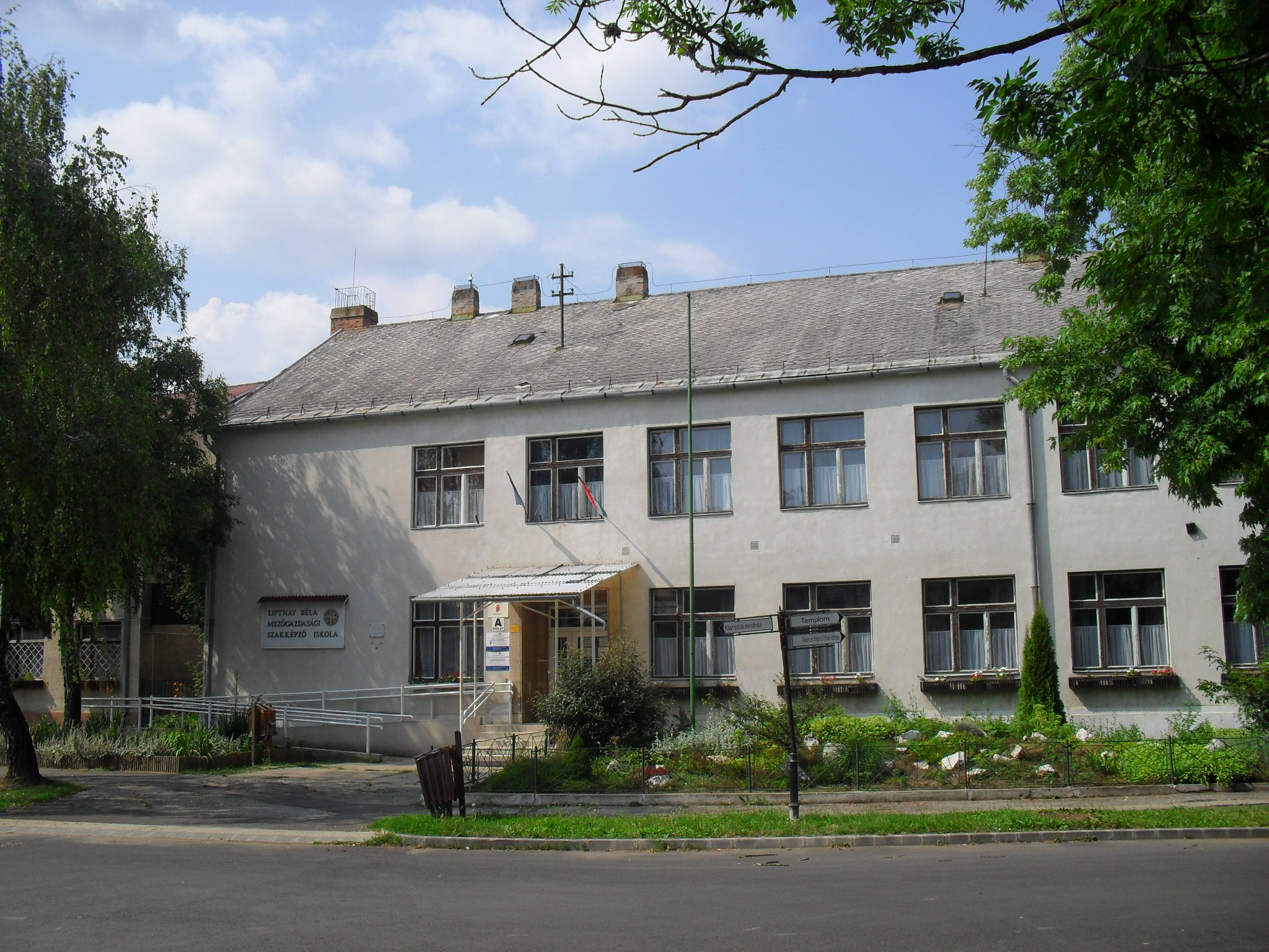 Szécsény - Lipthay Béla Mezőgazdasági Szakképző Iskola